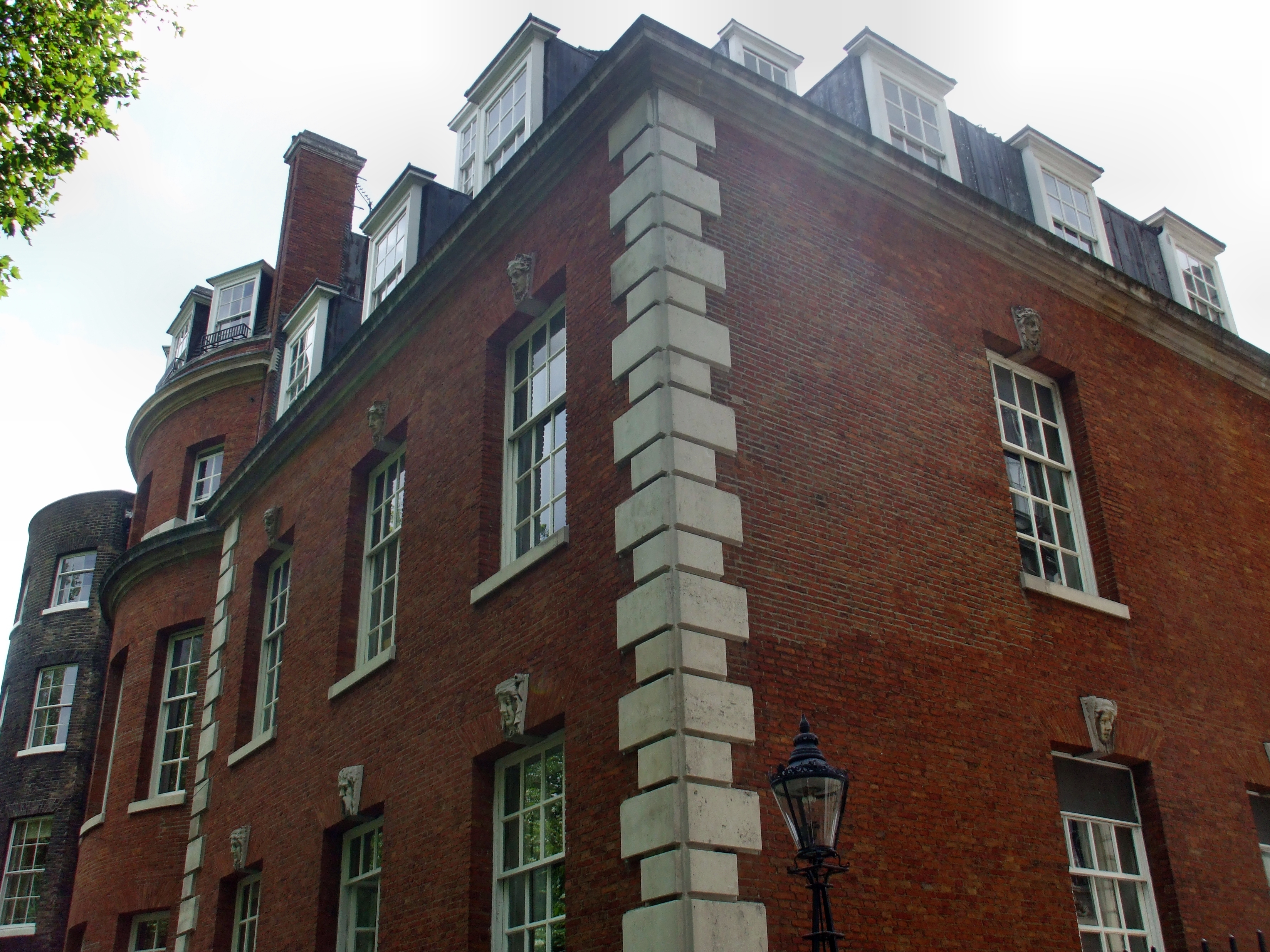 Außenansicht des St. Stephen's Club